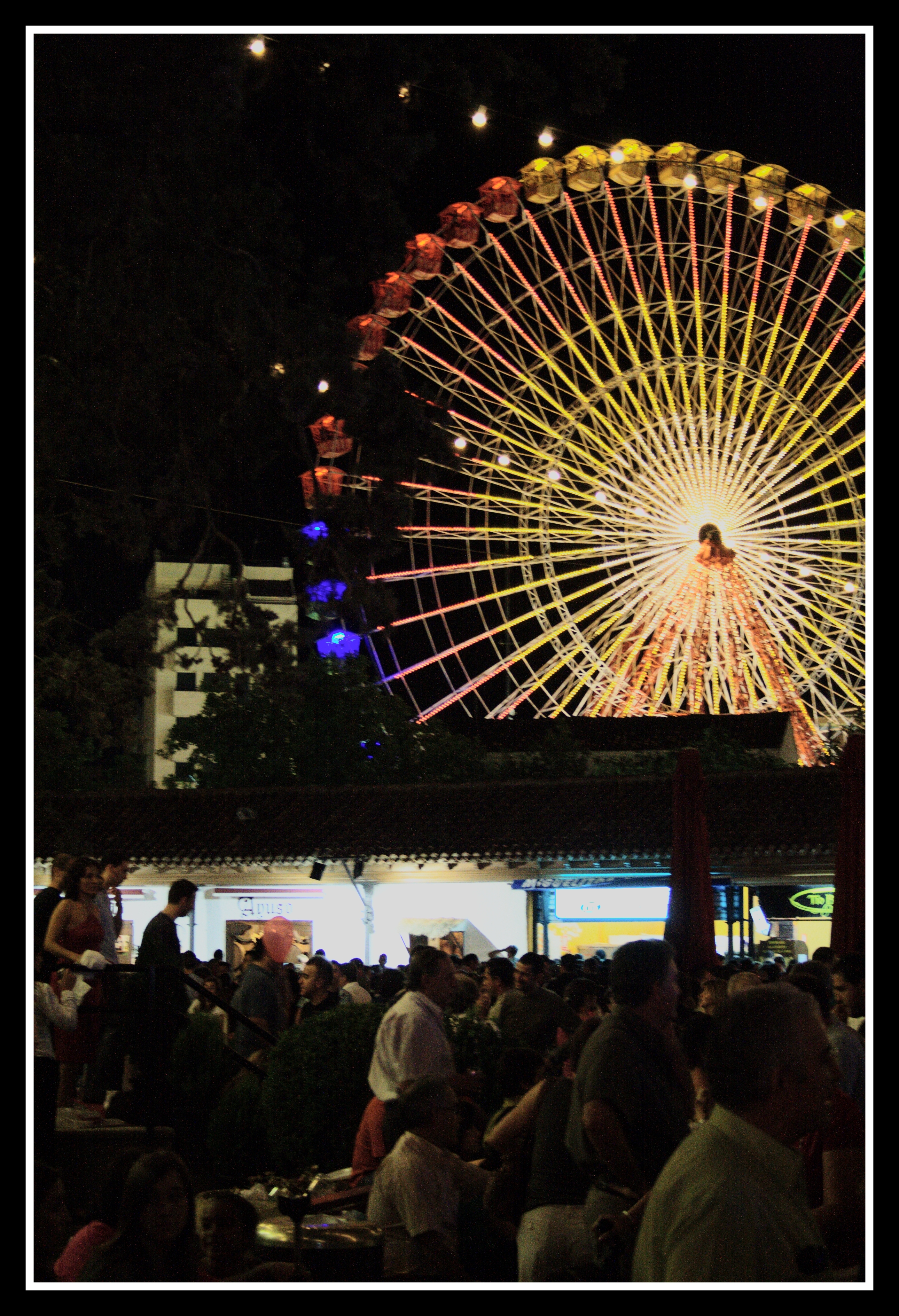 Feria de Albacete 2007_03